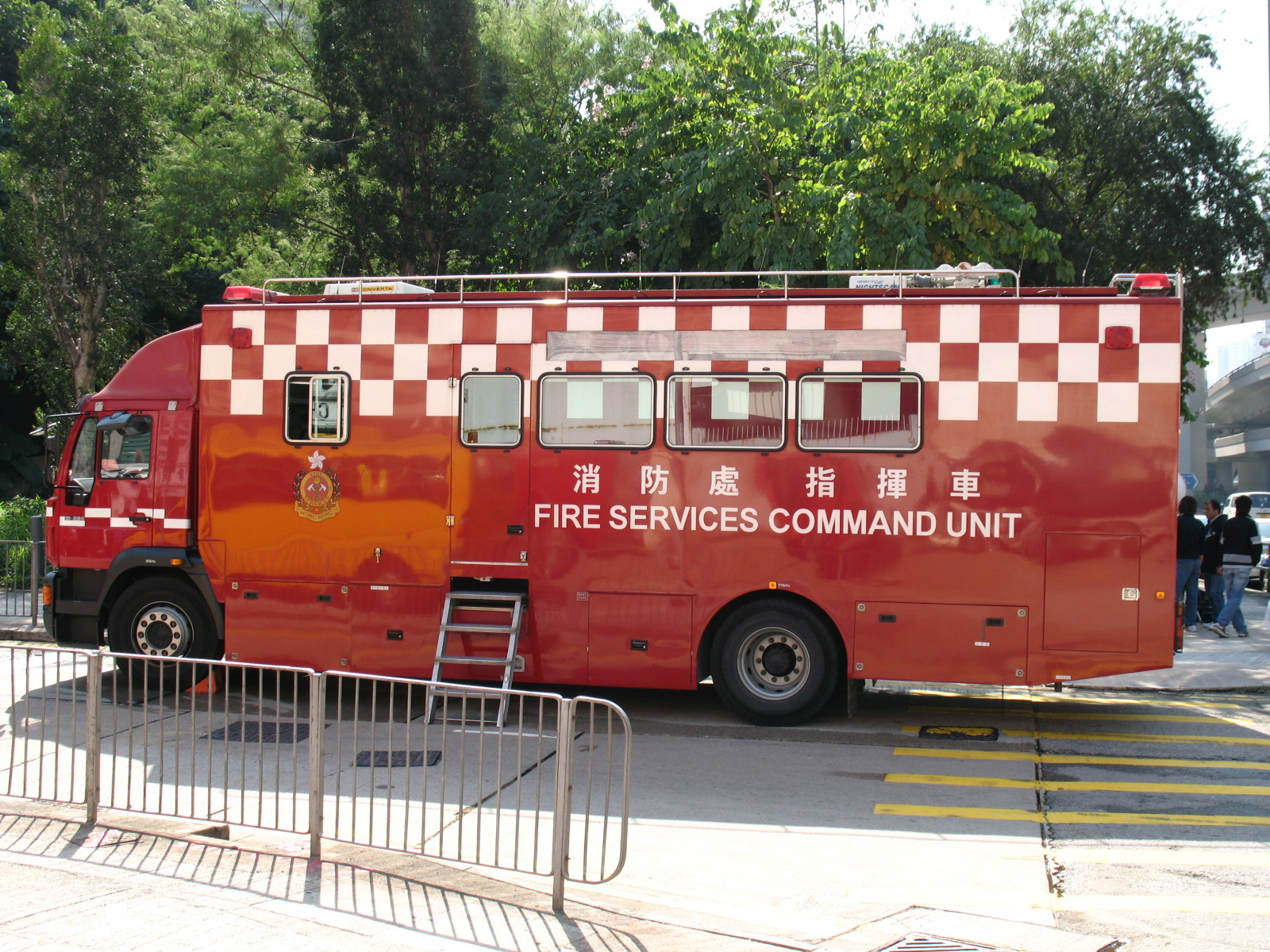 中文（香港）: 香港消防處的現場指揮車，全車採用德國製造的猛獅18.284中型貨車底盤，及香港製造的現場指揮車車身組裝而成。